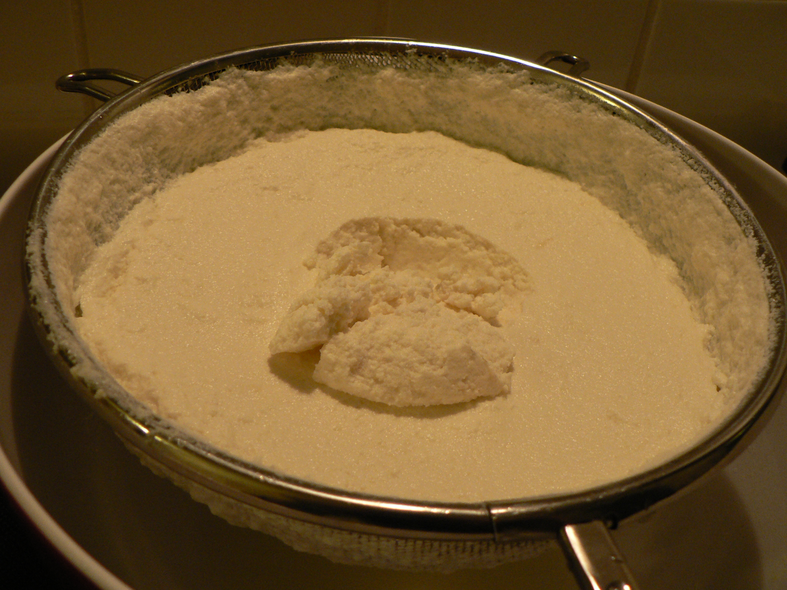 matten bereid uit 3 l volle melk (GB) en 1 l karnemelk (Gervais)